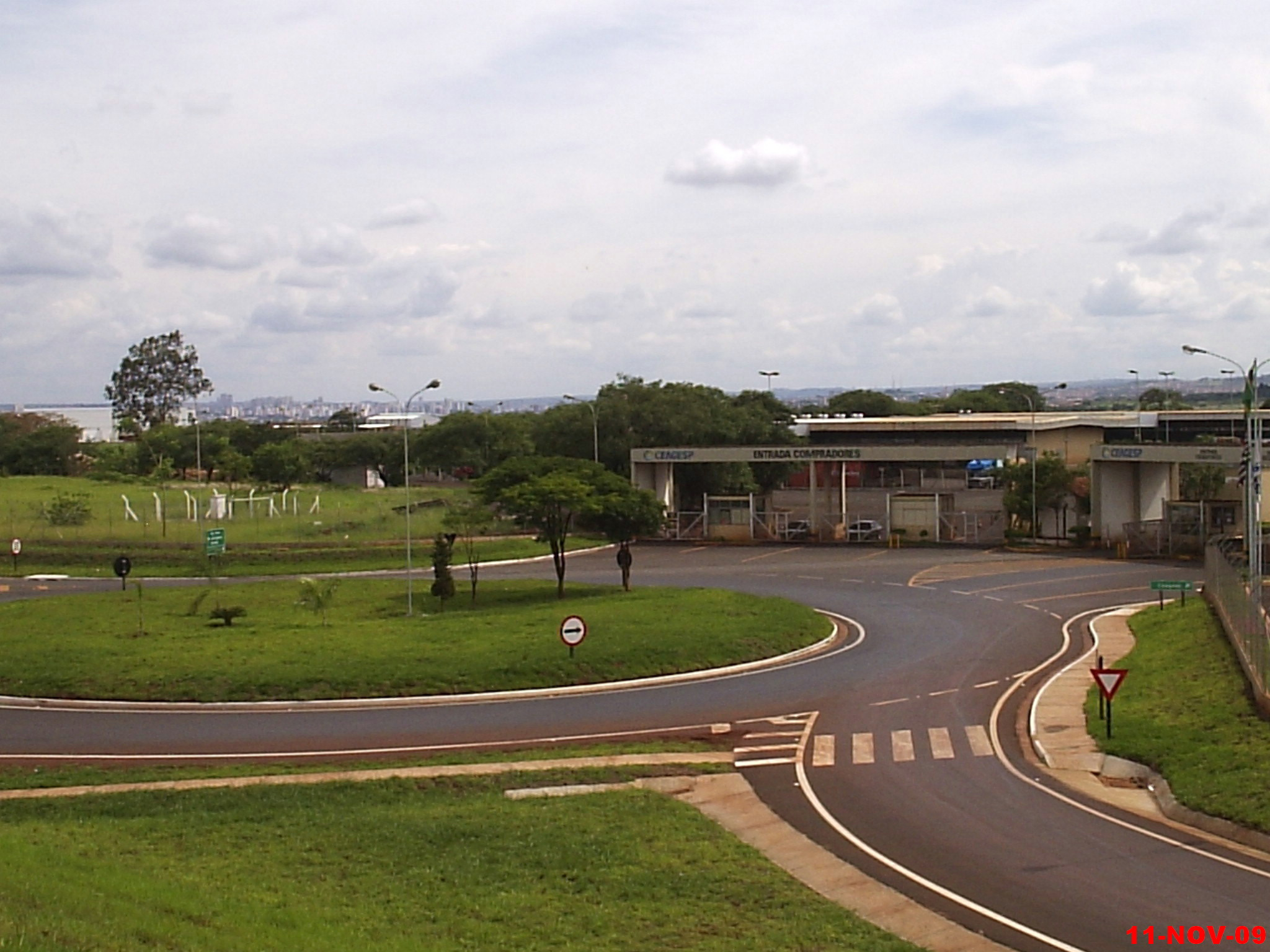 CEAGESP - Vista da Rod. Anhanguera e ao fundo a cidade de Ribeirão Preto